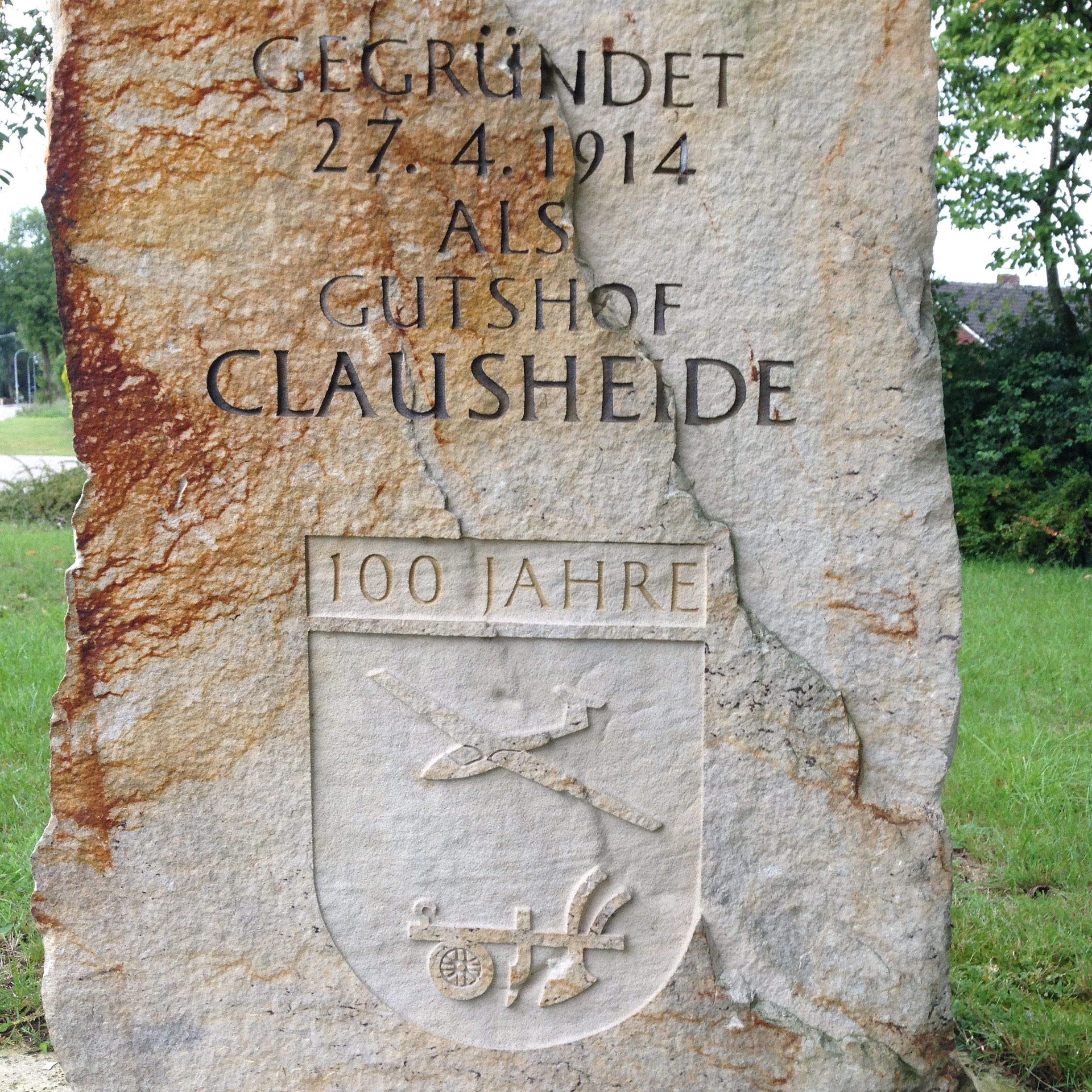 Gedenkstein zum 100. Gründungstag von Gut Klausheide 2014 (Grafschaft Bentheim, Niedersachsen); Teilansicht